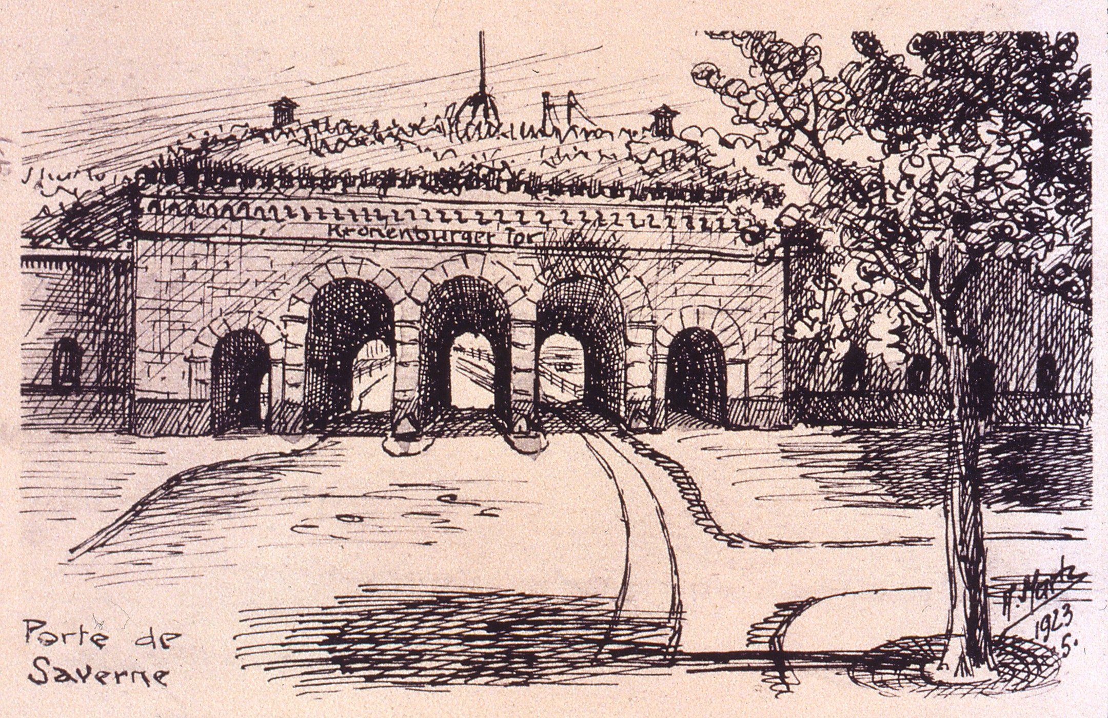 Dessin de la Porte de Saverne de Strasbourg par A. Maetz vers 1923